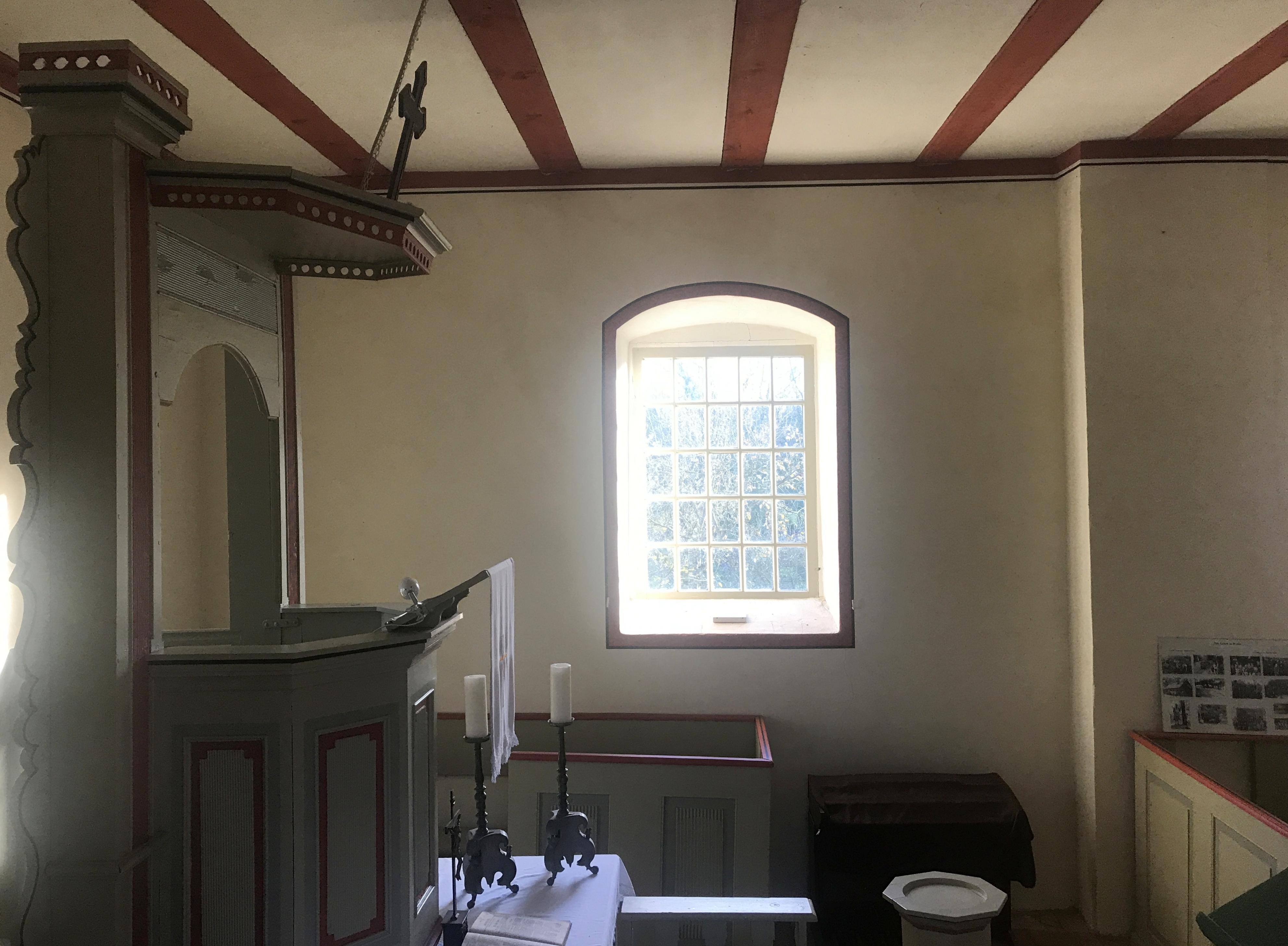 Die Dorfkirche Worin in der Gemeinde Vierlinden im Landkreis Märkisch-Oderland ist eine Feldsteinkirche aus dem 15. Jahrhundert. Im Innern steht unter anderem ein schlichter Kanzelaltar aus der Mitte des 19. Jahrhunderts